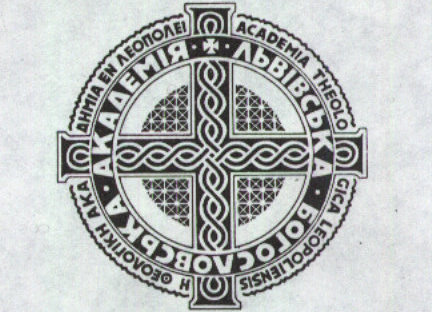 Емблема ЛБА